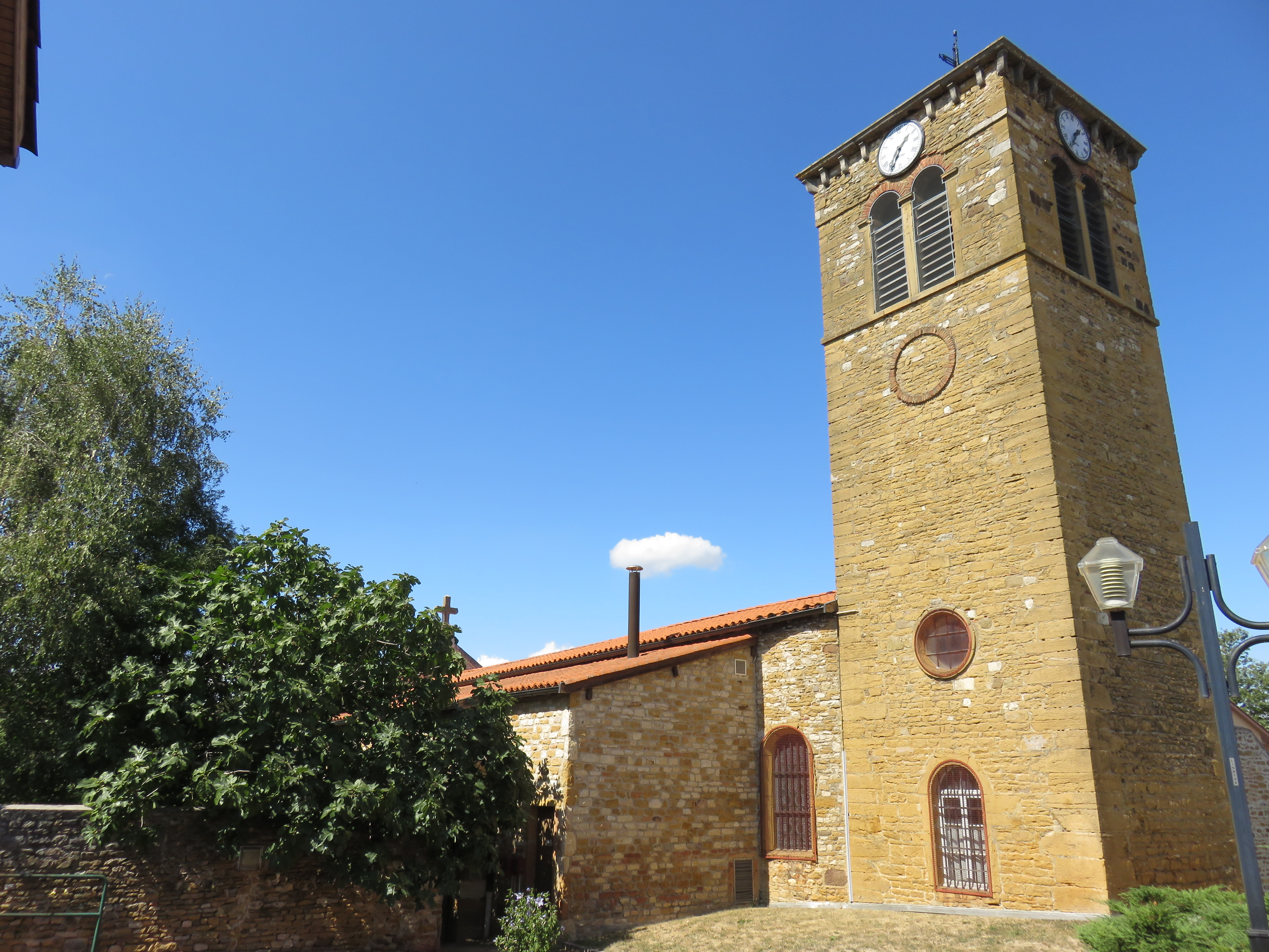 Église Saint-Christophe de Lissieu (Rhône, France).